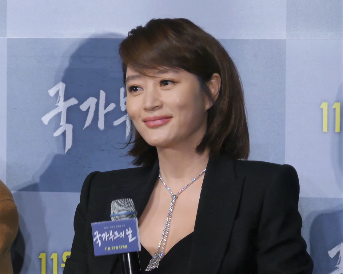 영화 '국가부도의 날'(감독 최국희/제작 영화사 집) 제작보고회가 24일 오전 서울 강남구 CGV 압구정에서 열렸다.